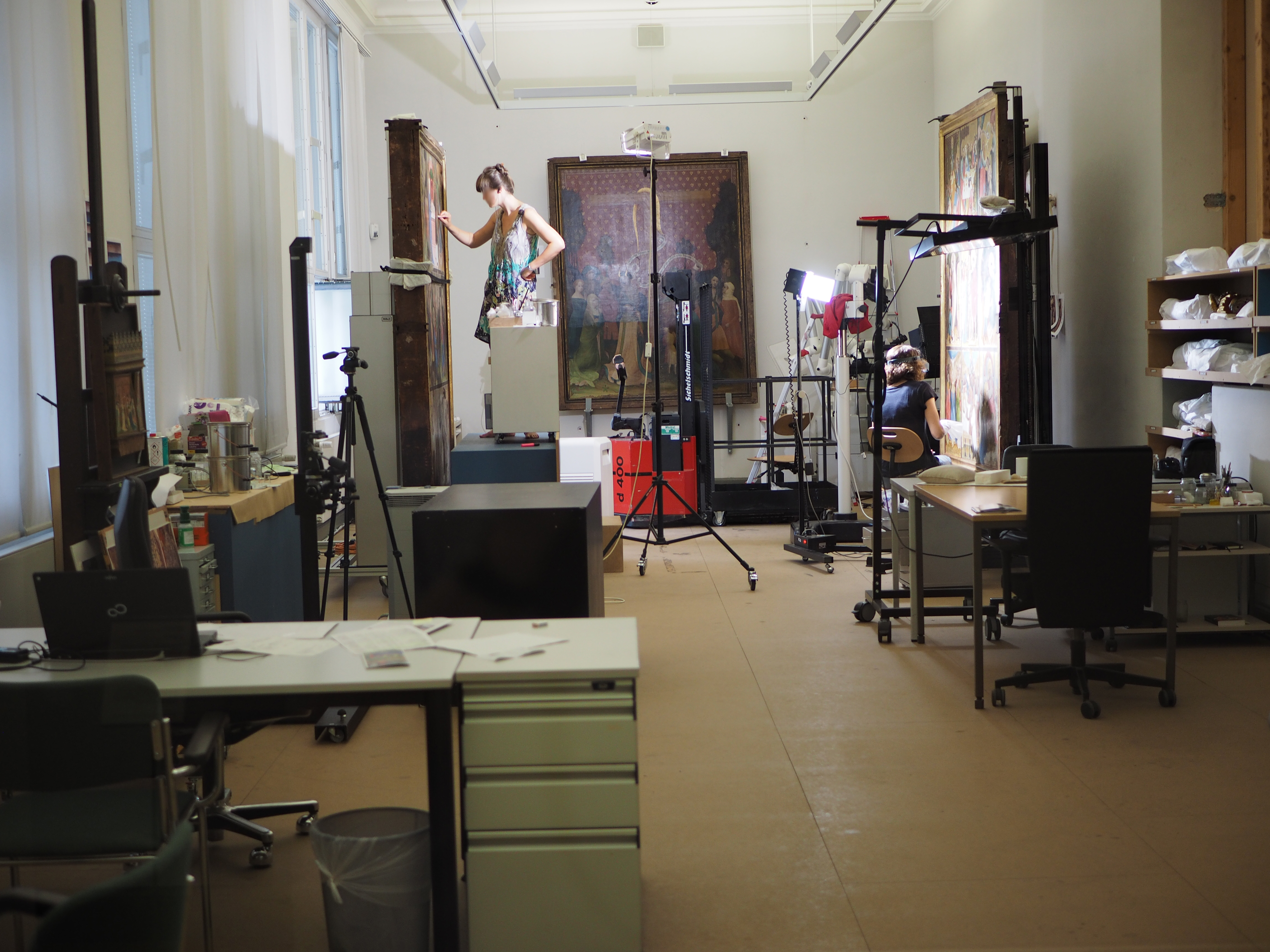 Restaurierungs-Werkstatt des Niedersächsischen Landesmuseums Hannover